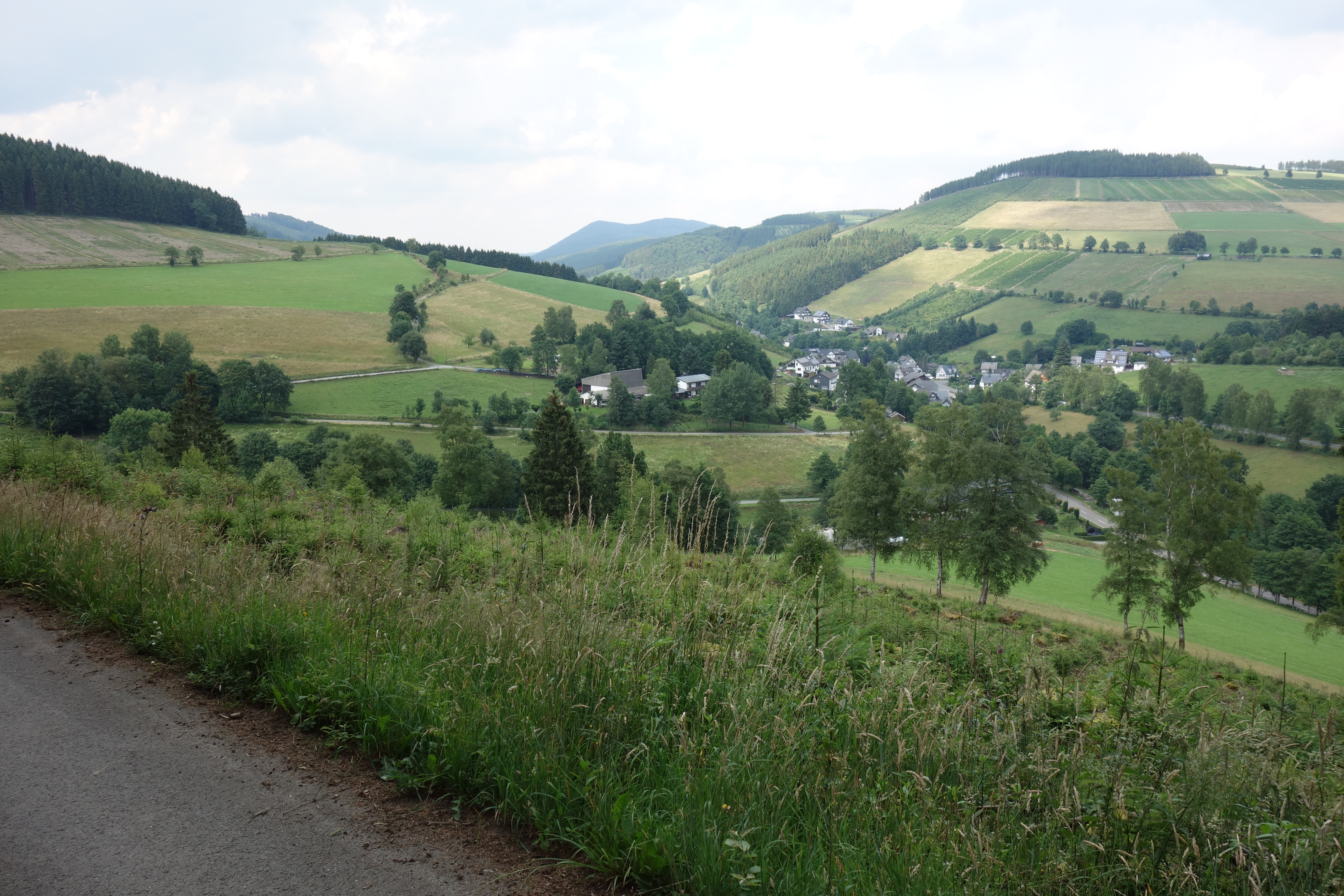 Landschaftsschutzgebiet Offenlandschaftskomplex Elpe um Elpe, Bergkuppen mit Wald gehören zum LSG Olsberg.